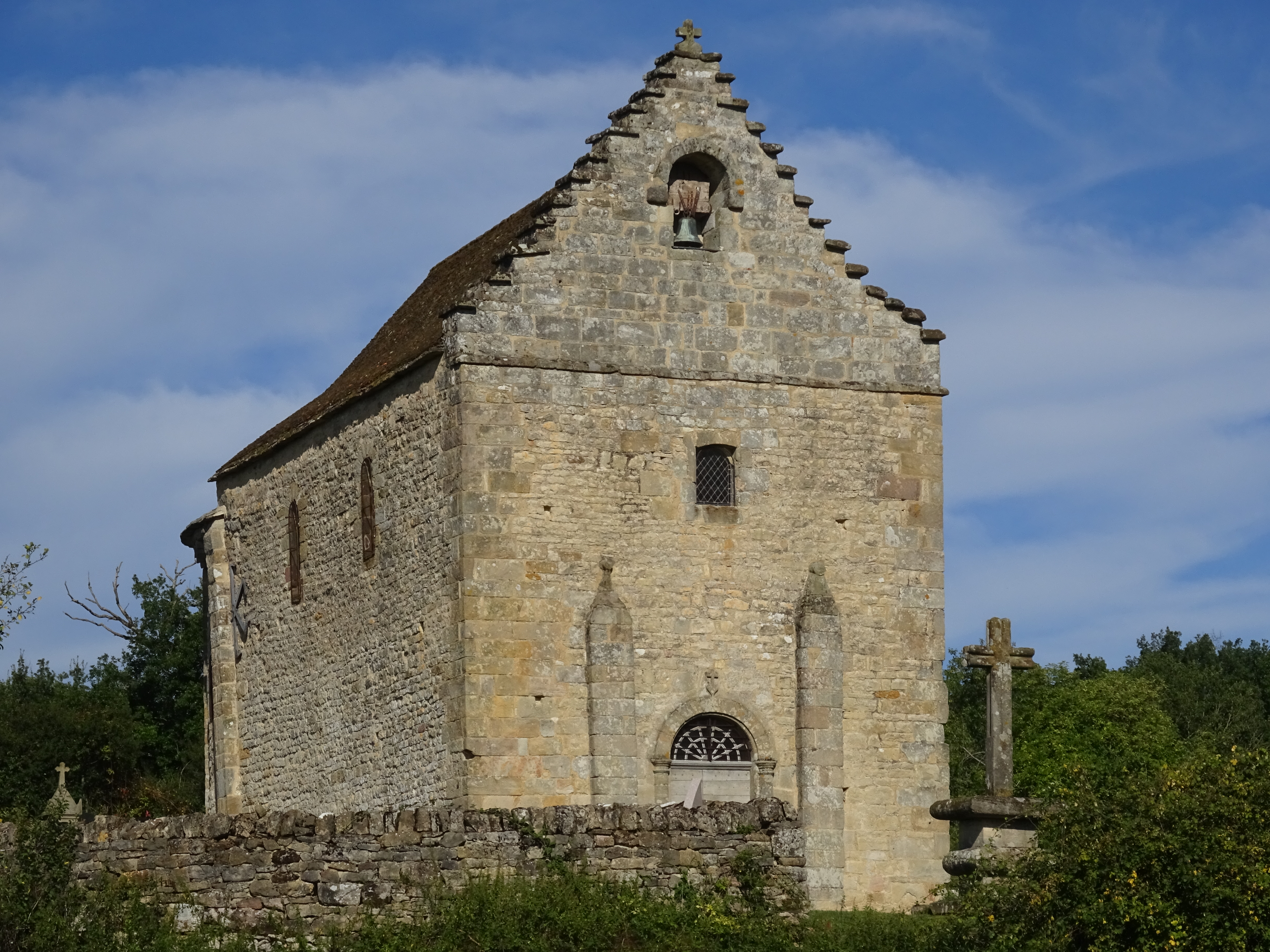 Chapelle Saint-Médard à Issepts (Lot, France).